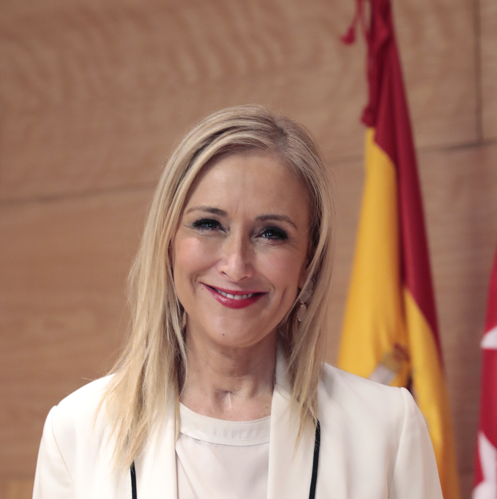 En el Consejo de Gobierno que he presidido hoy, hemos tratado temas tan importantes como la creación de un centro especializado para atender adolescentes adictos a las nuevas tecnología, que entrará en funcionamiento en enero de 2018; la aprobación del Plan de Ahorro y Eficiencia Energética en Edificios Públicos, que pretende bajar el consumo de energía de los edificios públicos sin reducir sus prestaciones, de manera que se incremente la eficiencia en la gestión de la energía y de los gastos corrientes de la Administración o, la inversión de 60 millones para la mejora del firme de la Red Regional de Carreteras para mejorar la seguridad vial de tal manera que al final de la legislatura hayamos podido actual en cerca del 50% de las carreteras regionales.